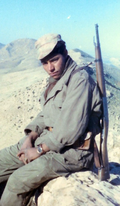 Un jeune harki en Algérie.